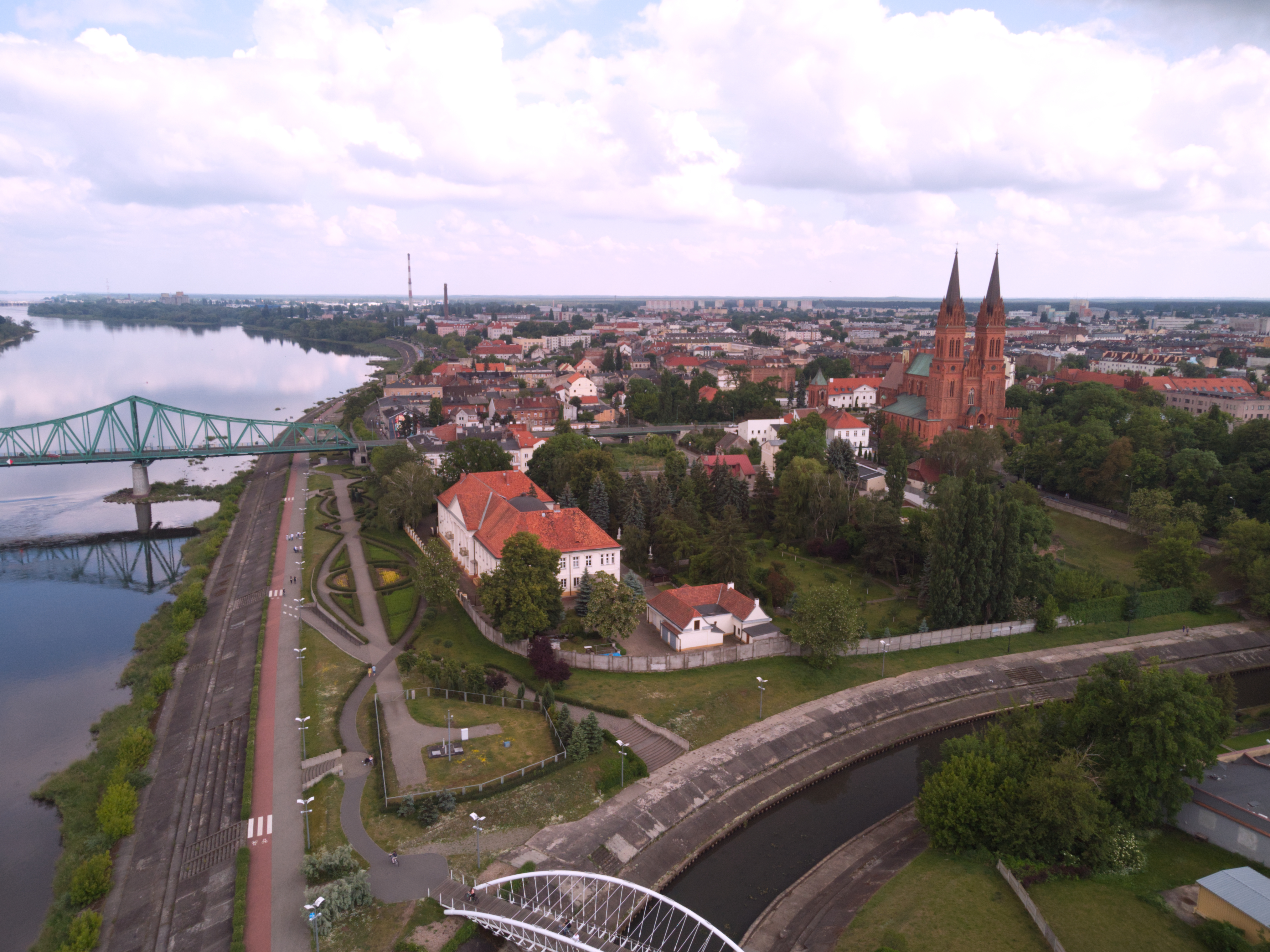 Bulwary (2020 r.)